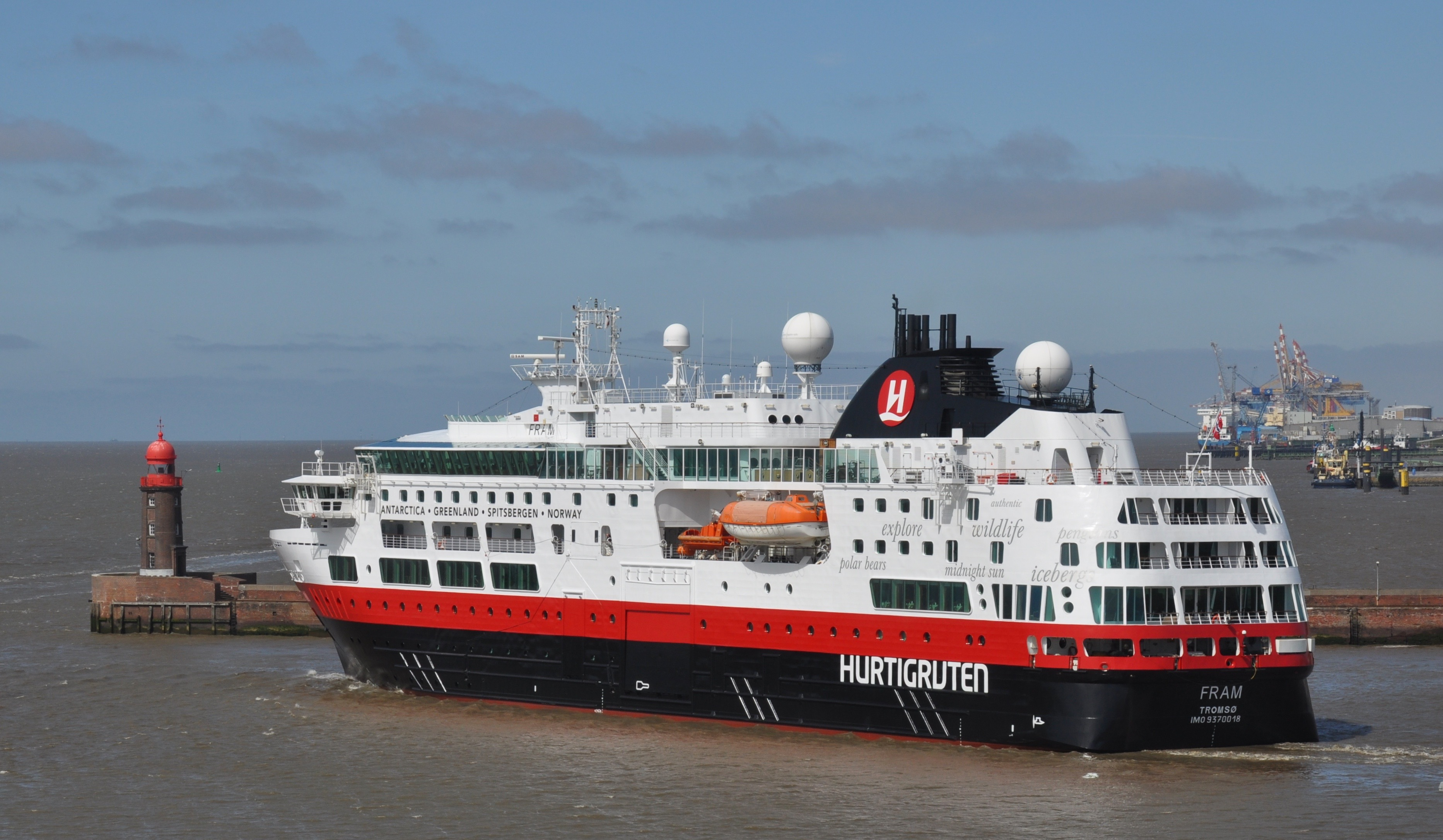 MS Fram, Hurtigruten, Bremerhaven